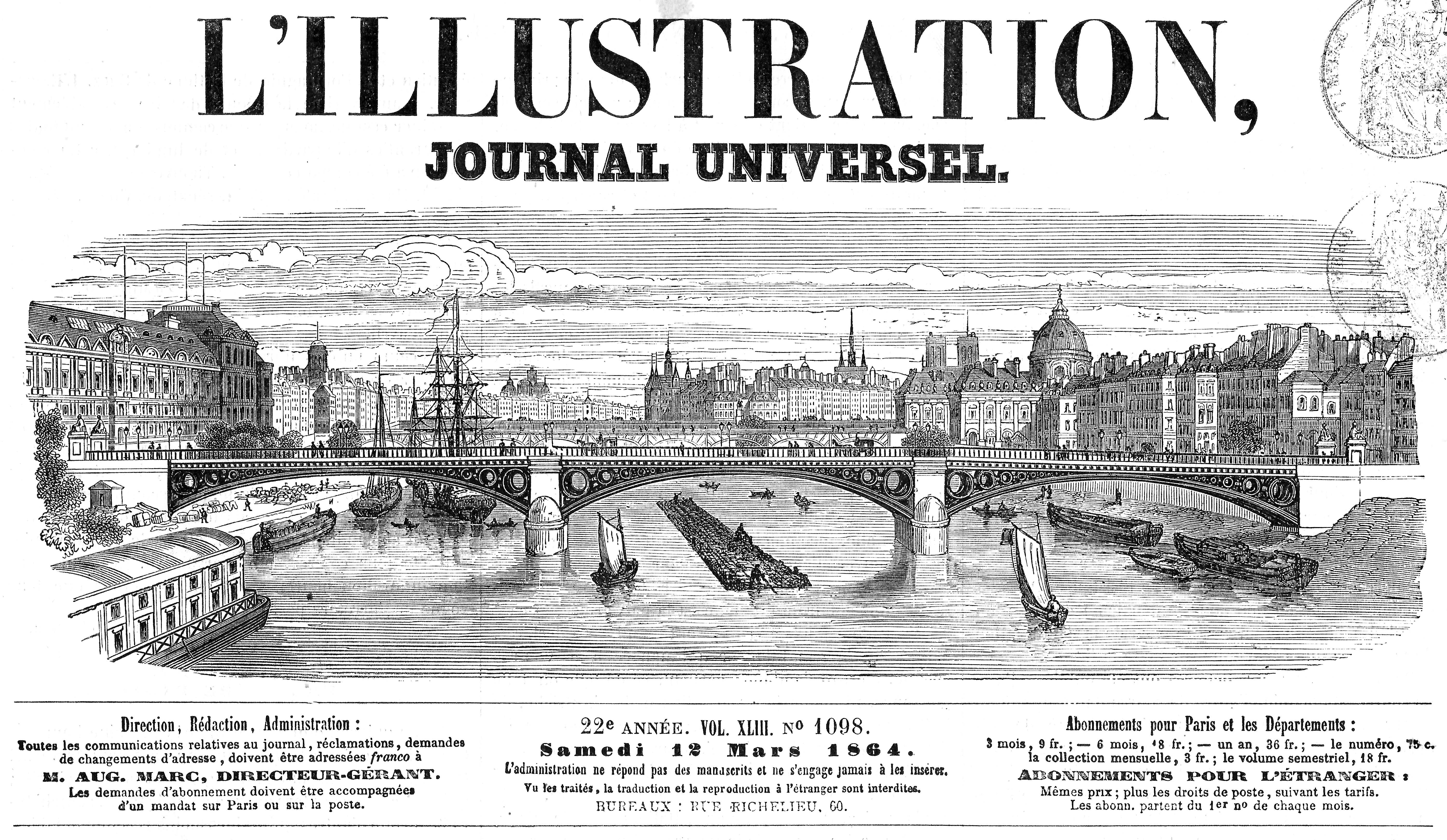 L’Illustration (France) — Newspaper title in 1864. L’Illustration (France) — Titre (bandeau) du journal en 1864.